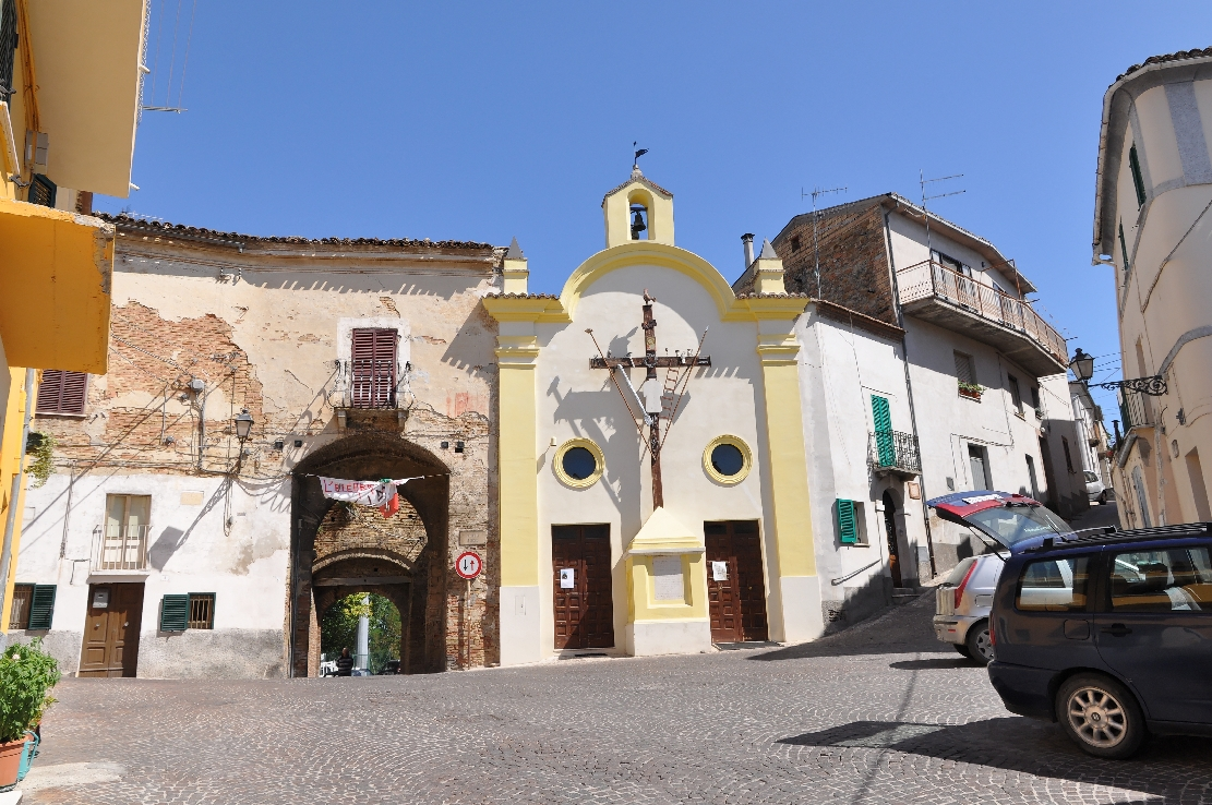 Penne (comune, Italy) 2012